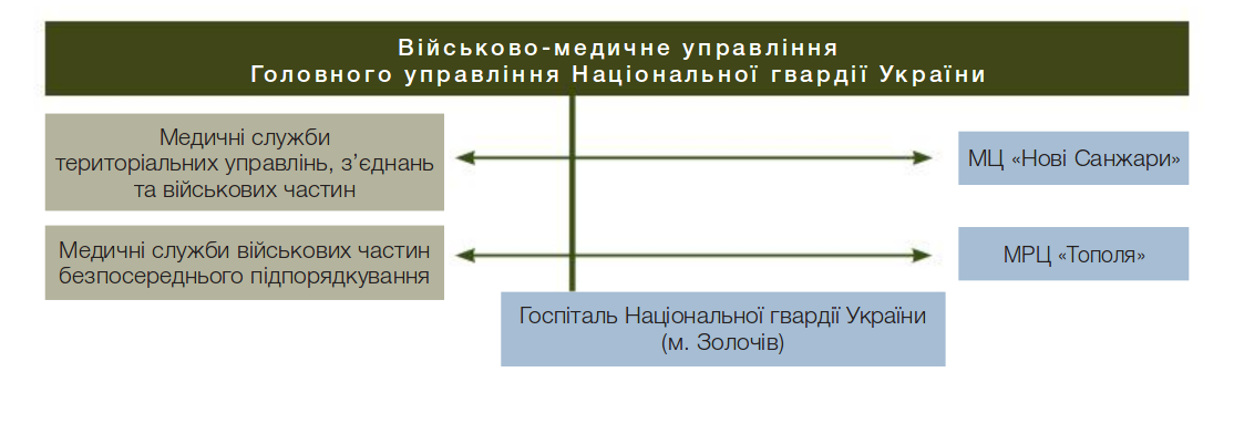 Національна гвардія України, Структура медичного департаменту